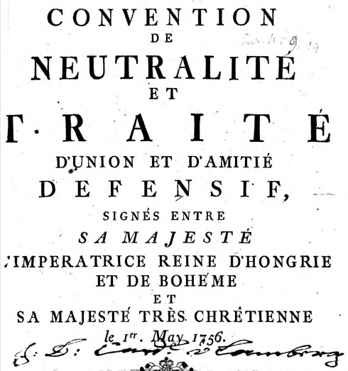 Titelblatt des Druckes: Convention de Neutralité et Traité d'union ... entre S. M. l'Imperatrice ... et S. M. tres Chrétienne 1756, Wien 1756.